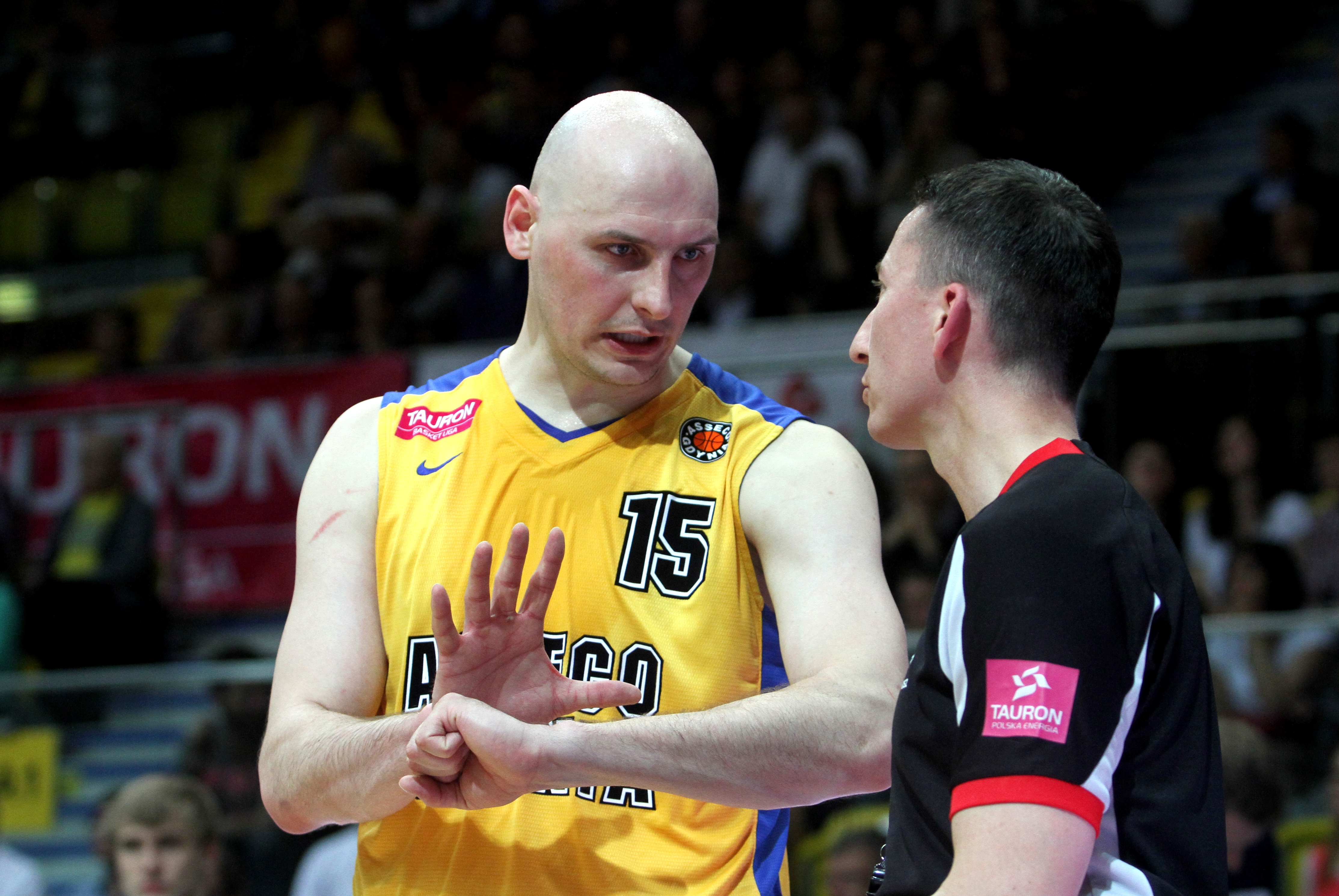 Przemysław Frasunkiewicz Asseco Gdynia